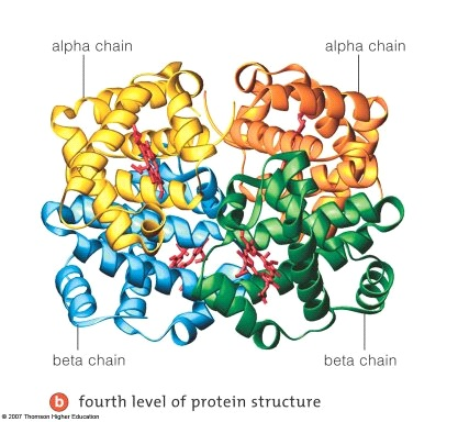 StrukturaKatersore